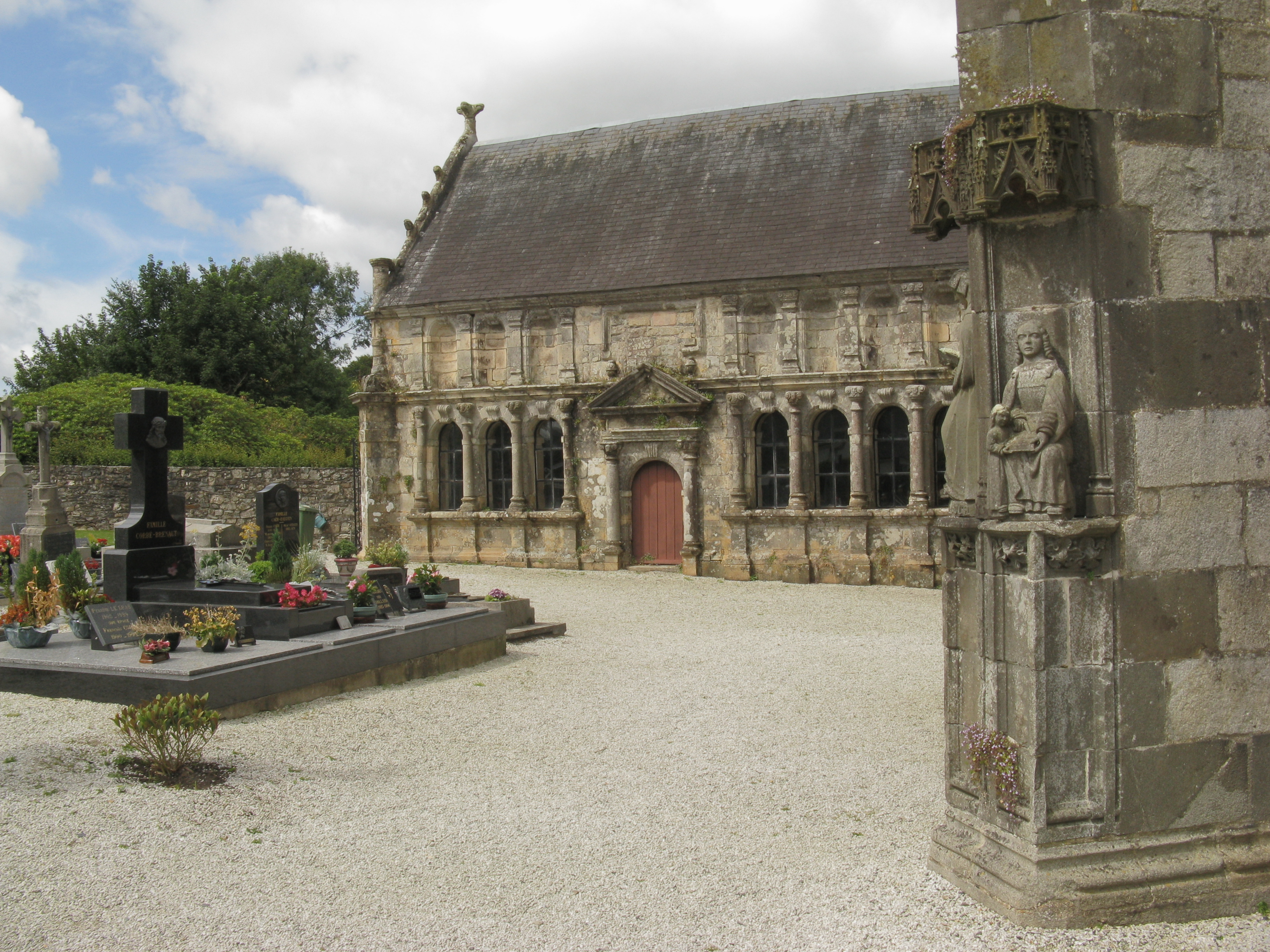 Enclos paroissial van Pencran, Bretagne